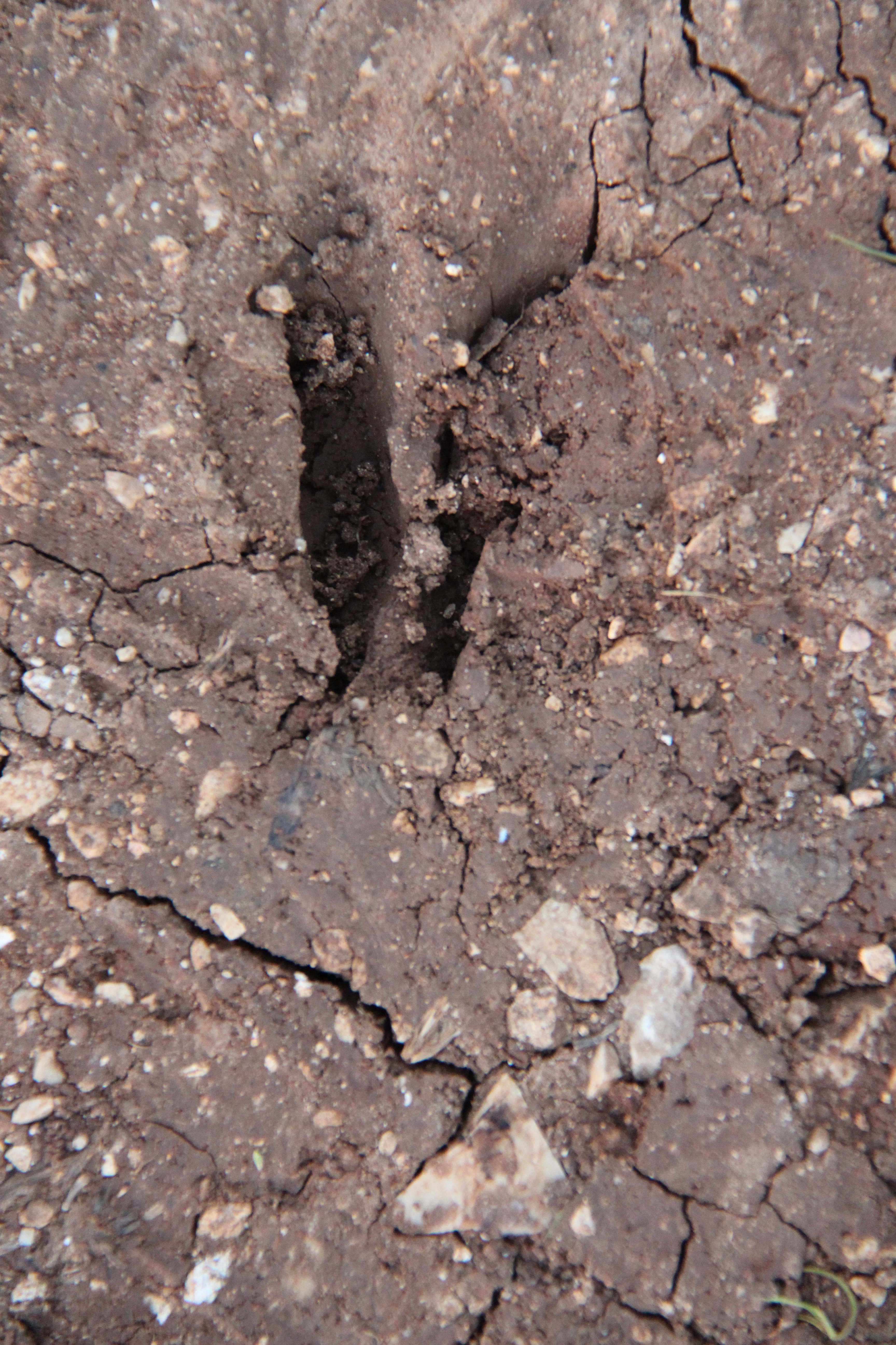 עקבות צבי בנחל זמרי